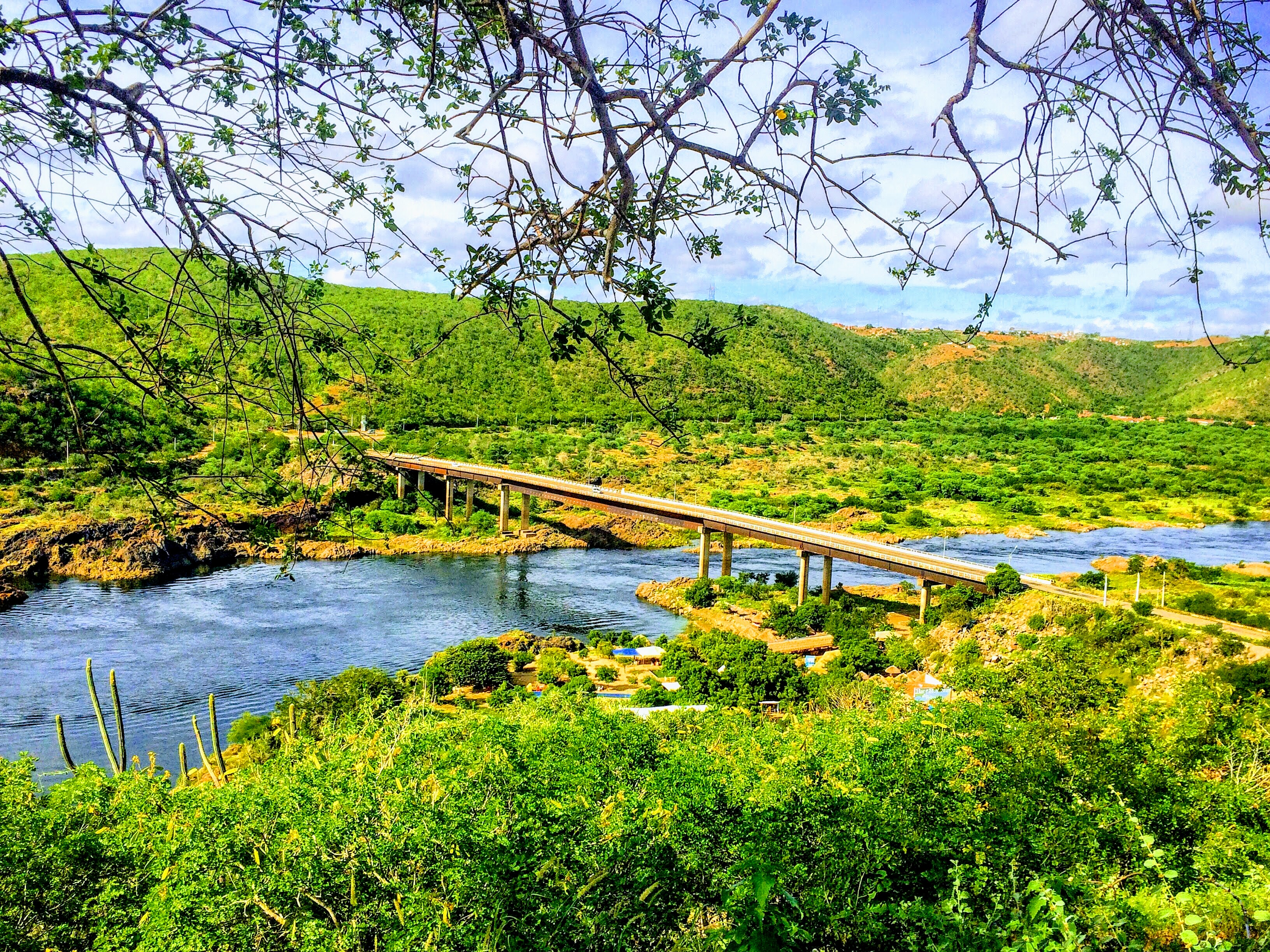 Foto registrada em Piranhas AL. Ponte sobre o Rio São Francisco e da acesso a cidade de Canindé de São Francisco/SE